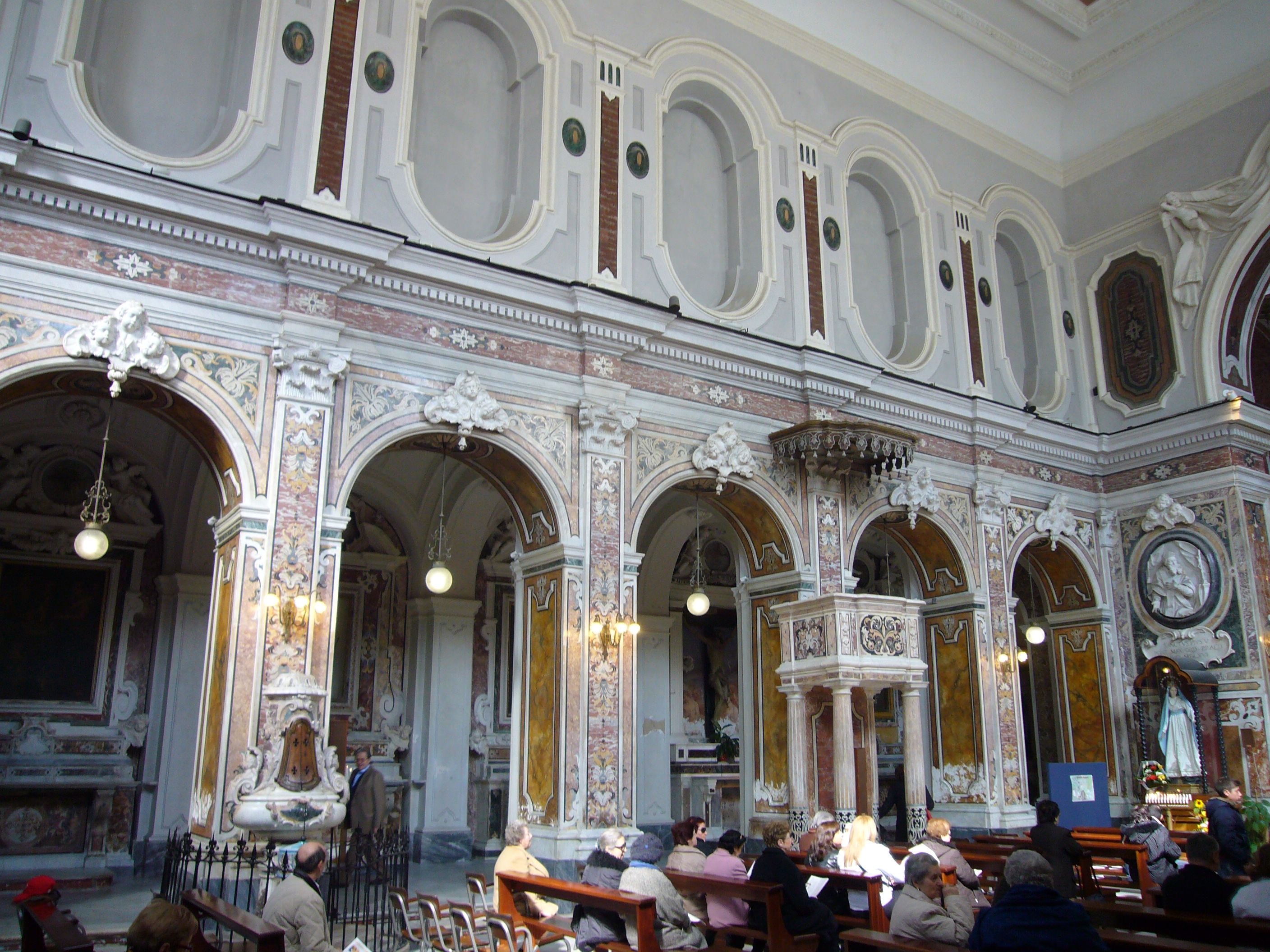 Napoli, Sant'Anna di Palazzo - interno